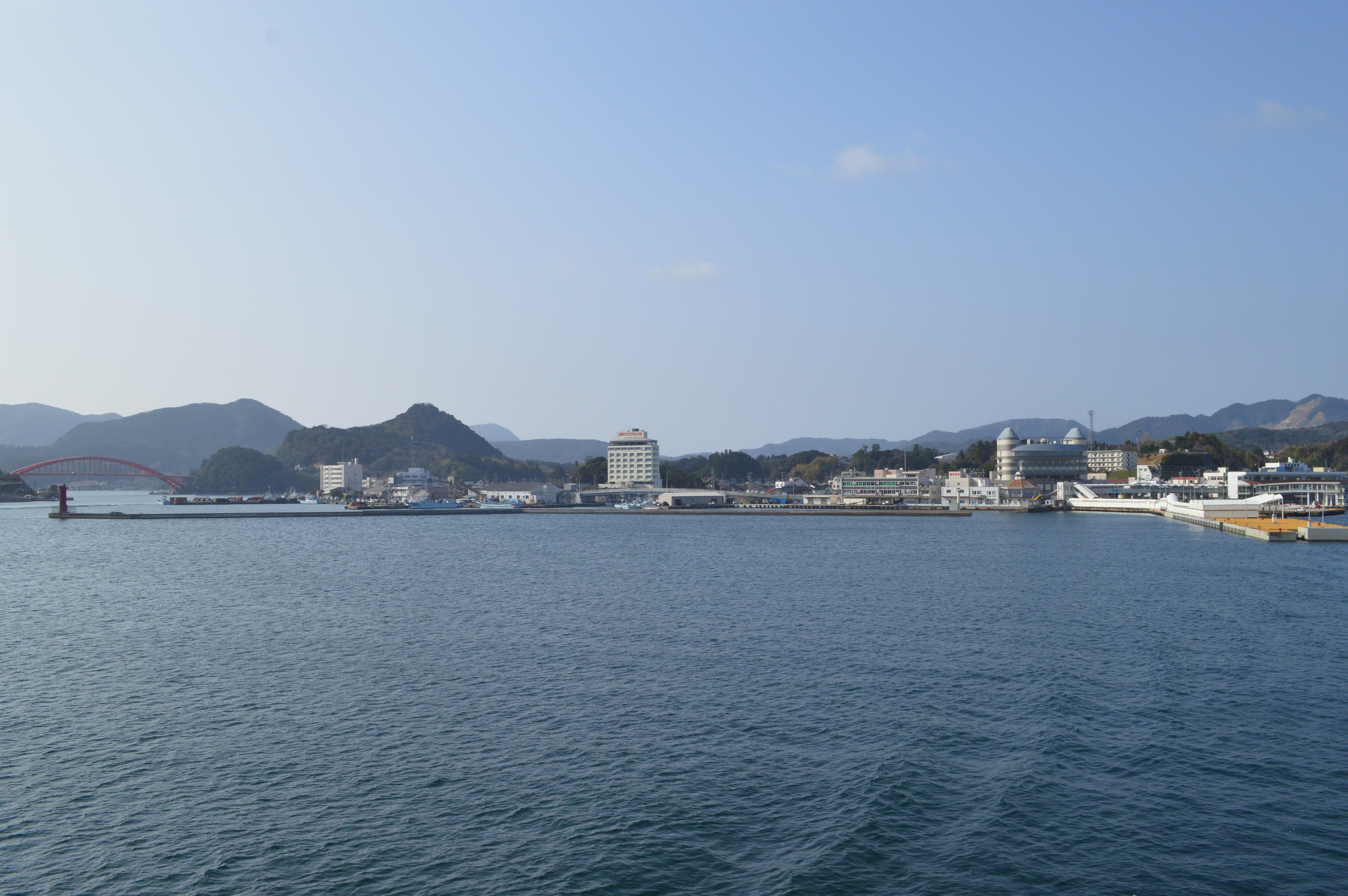 西郷港 概観